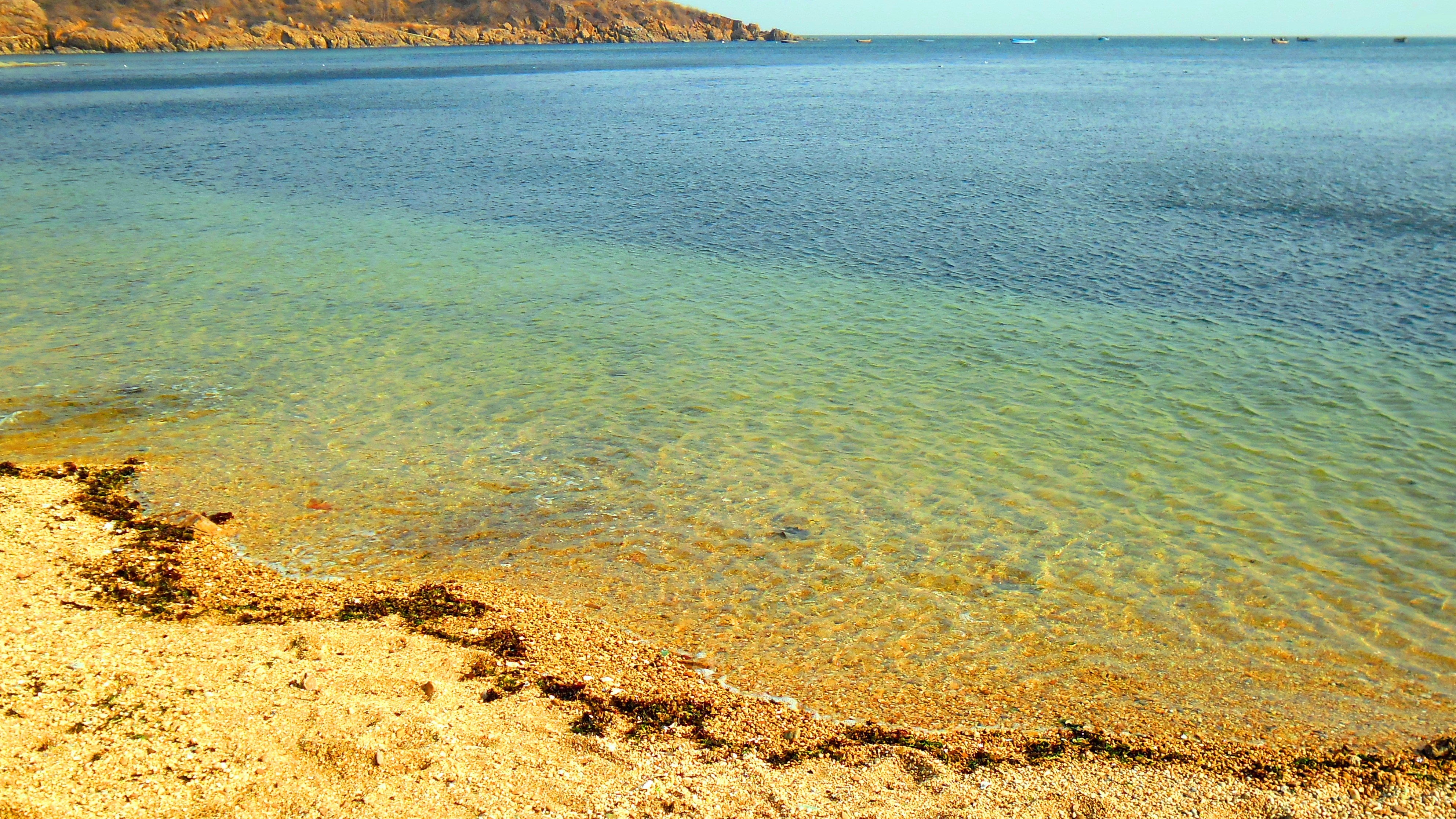 中文（中国大陆）: 辽宁省大连市